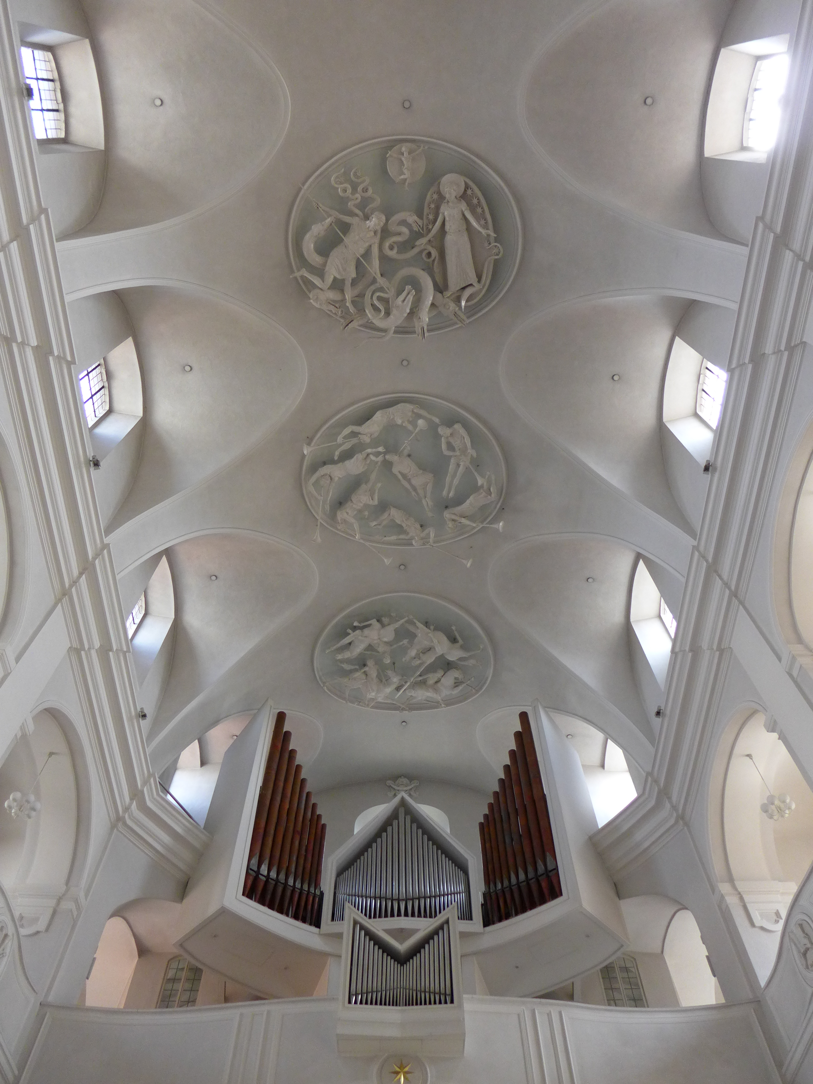 St. Michael (Würzburg), Kircheninneres, Gewölbe mit Blick zur Orgel